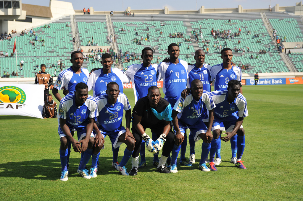 Al Hilal Omdurman, effectif saison 2011-2012